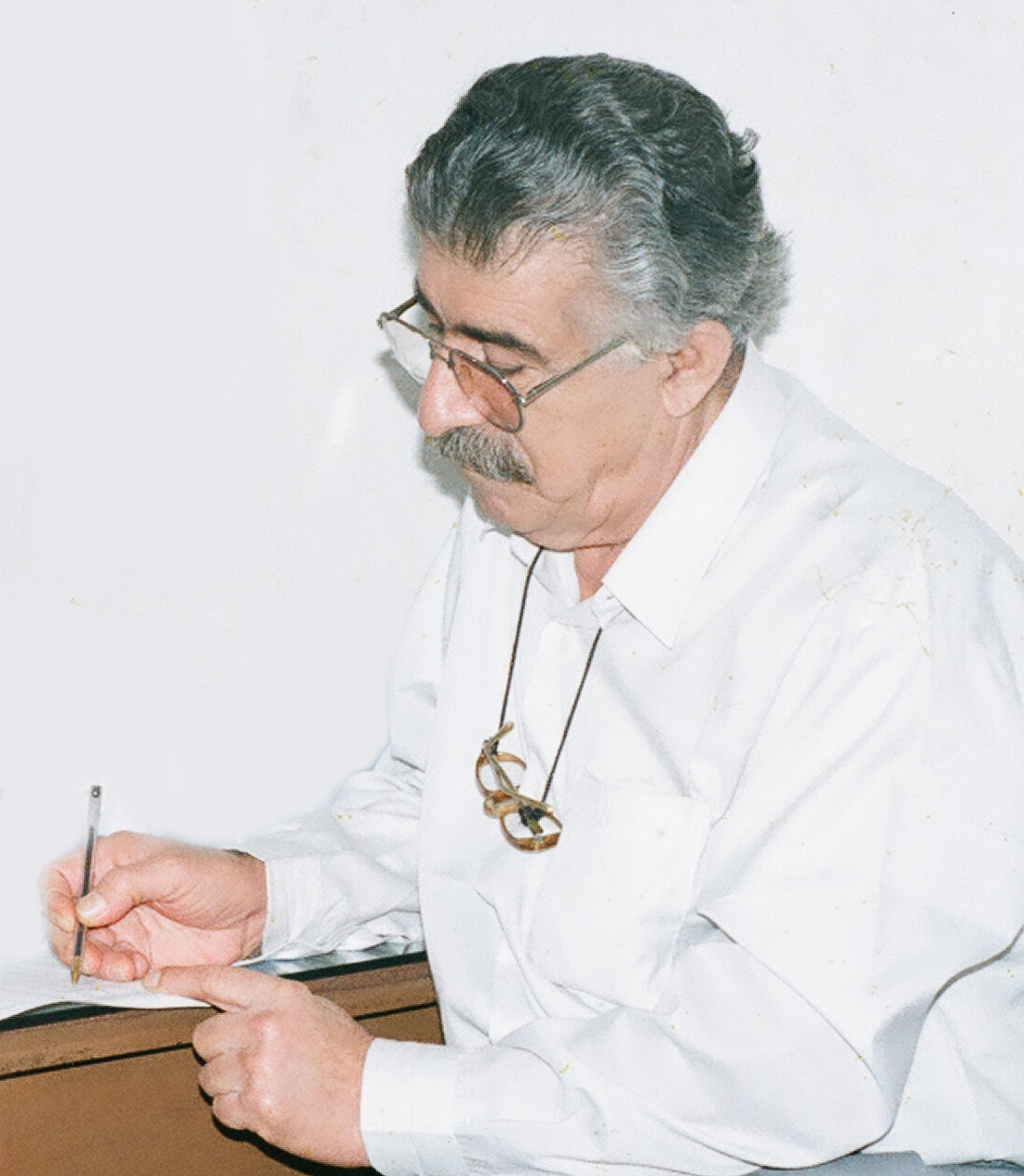 تصویر منوچهر آتشی